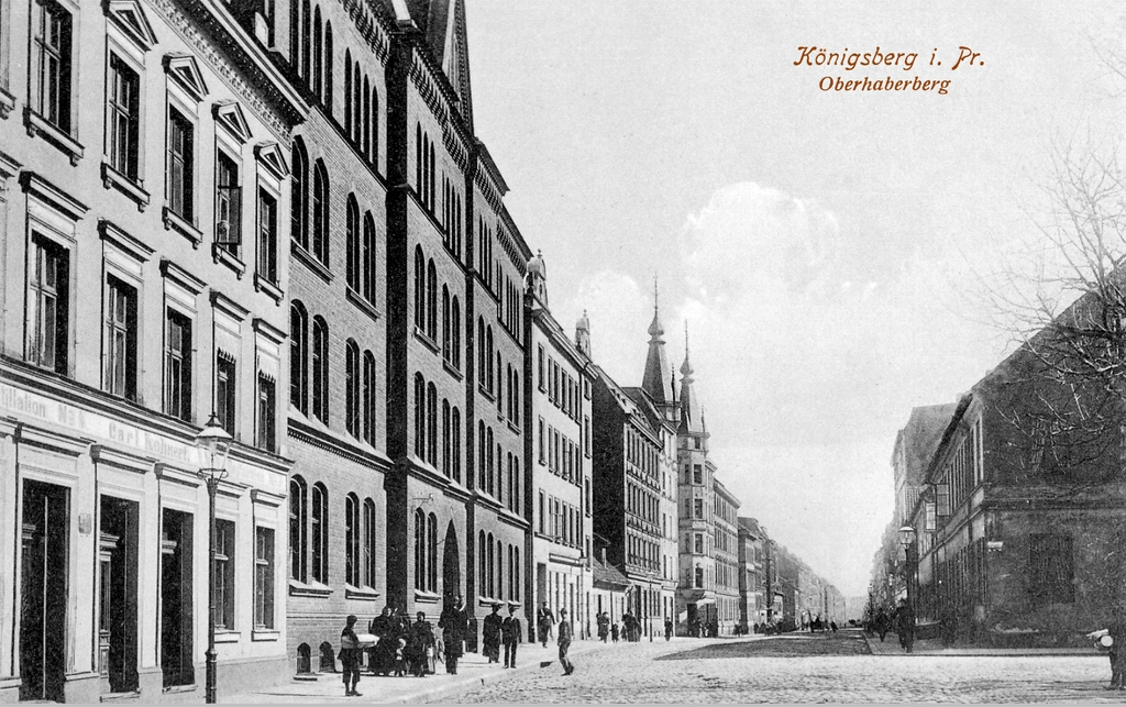 Königsberg